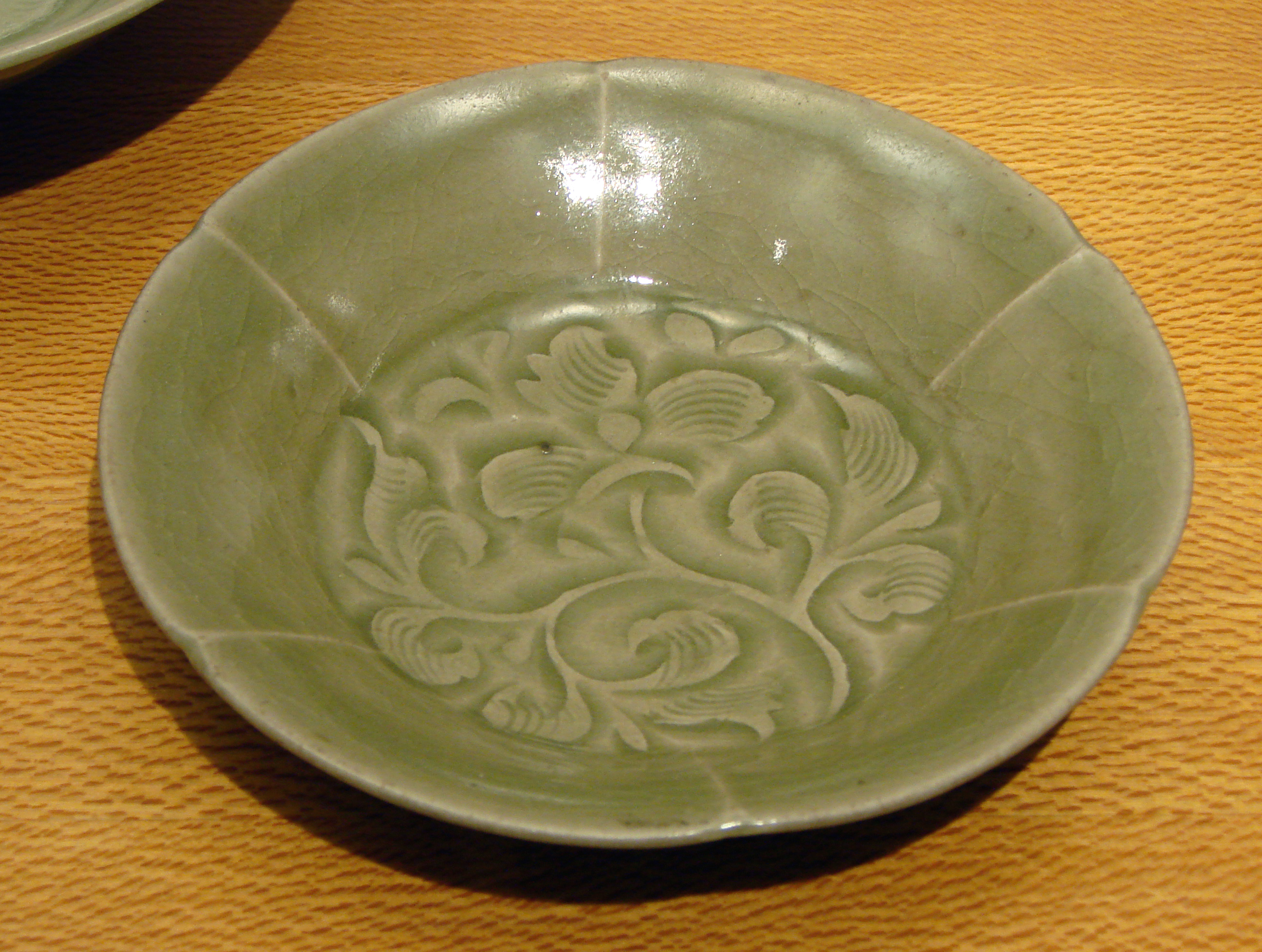 Coupe, grès de type céladon, décor incisé et moulé. Chine du Nord, Shaanxi, Yaozhou, Dynastie des Song du Nord, 10ème-11ème siècle. Musée Guimet, Paris. [No, this seems to be carved and combed, not moulded. I think he's just repeating these descriptions.